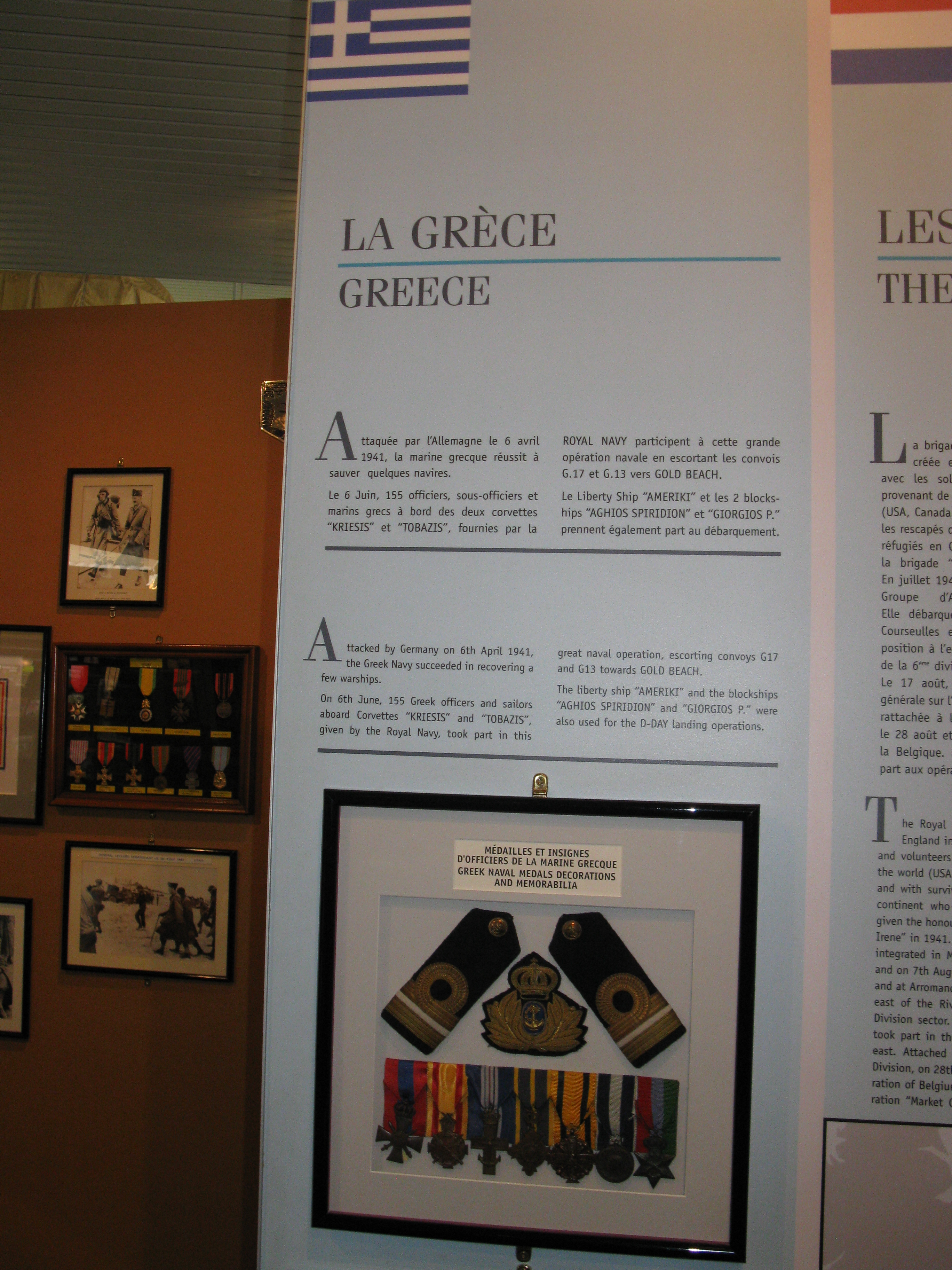 Έκθεμα του Μουσείου της Αρρομάνς αφιερωμένο στην Ελληνική συμμετοχή στην Απόβαση